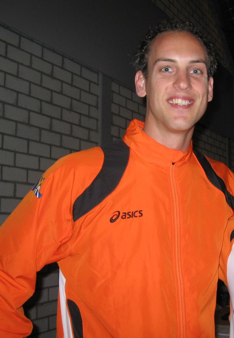 Nederlands korfbalspeler